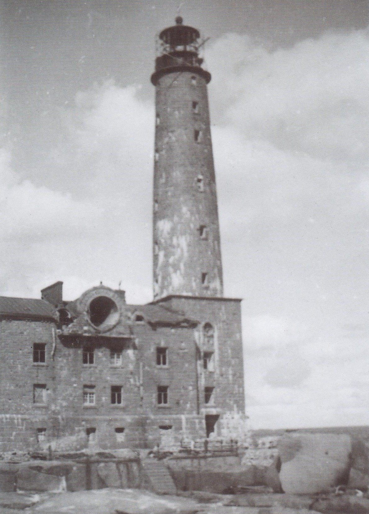 Bengtskärin majakka kuvattuna eteläpuolelta taistelujen jälkeen kesällä vuonna 1941.